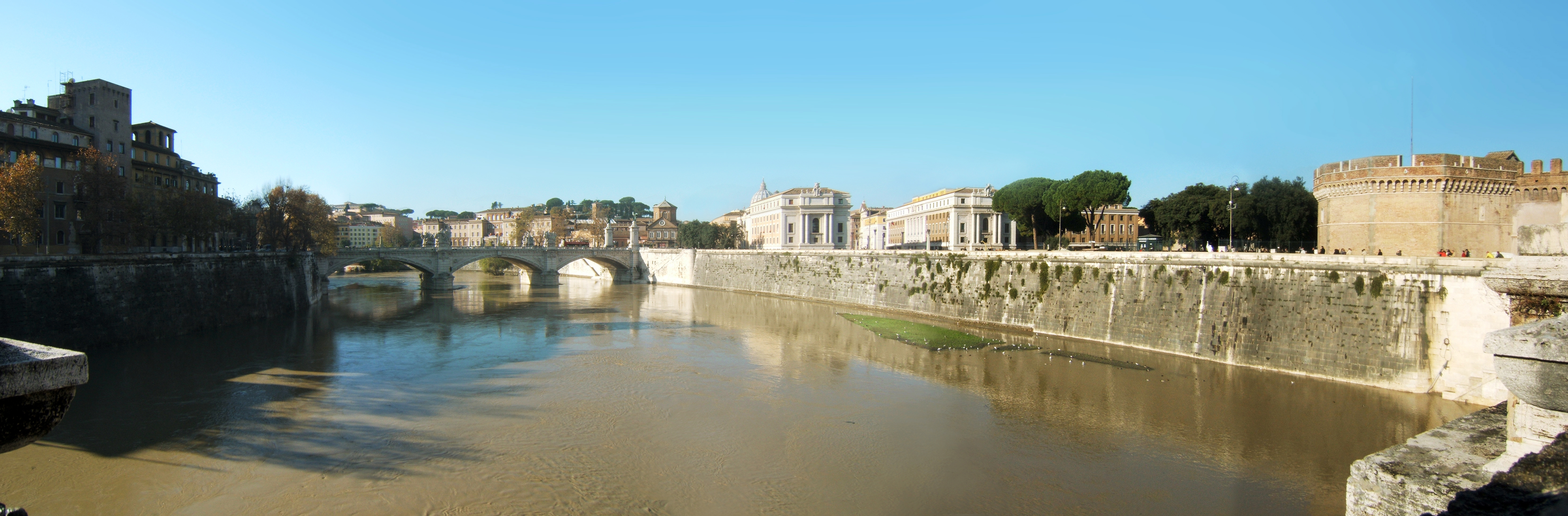 Panorama de Rome vu depuis le pont Sant'Angelo, avec le Tibre, le pont Victor-Emmanuel II, l'entrée de la Via della Conciliazione (qui mène à la Place Saint-Pierre), et, tout à droite, le château Sant-Angelo.